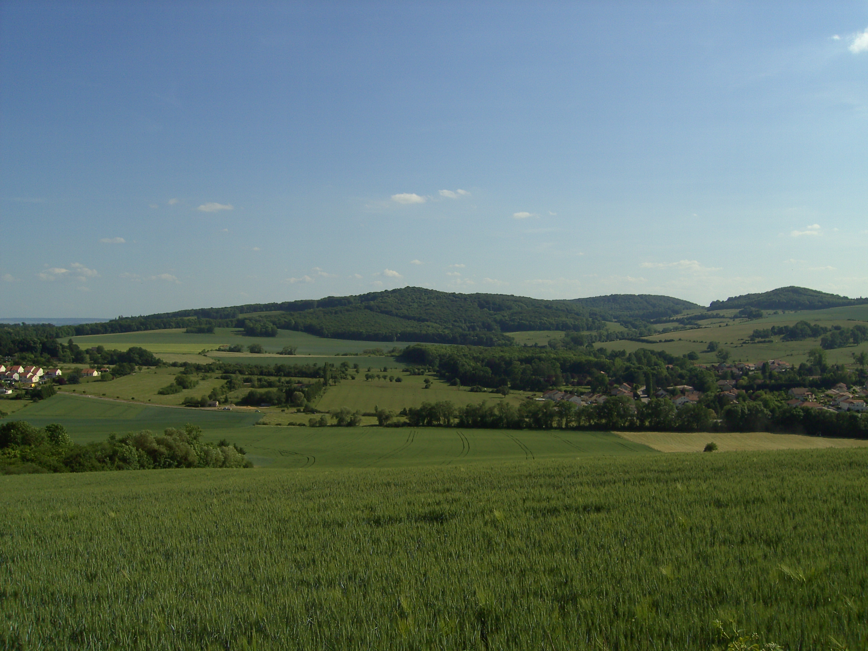 Paysage lorrain pris en photo depuis la côte de Sommy. Sur la gauche on peut voir le village Féy, et sur la droite le lotissement Clos-de-Beva de Corny-sur-Moselle.